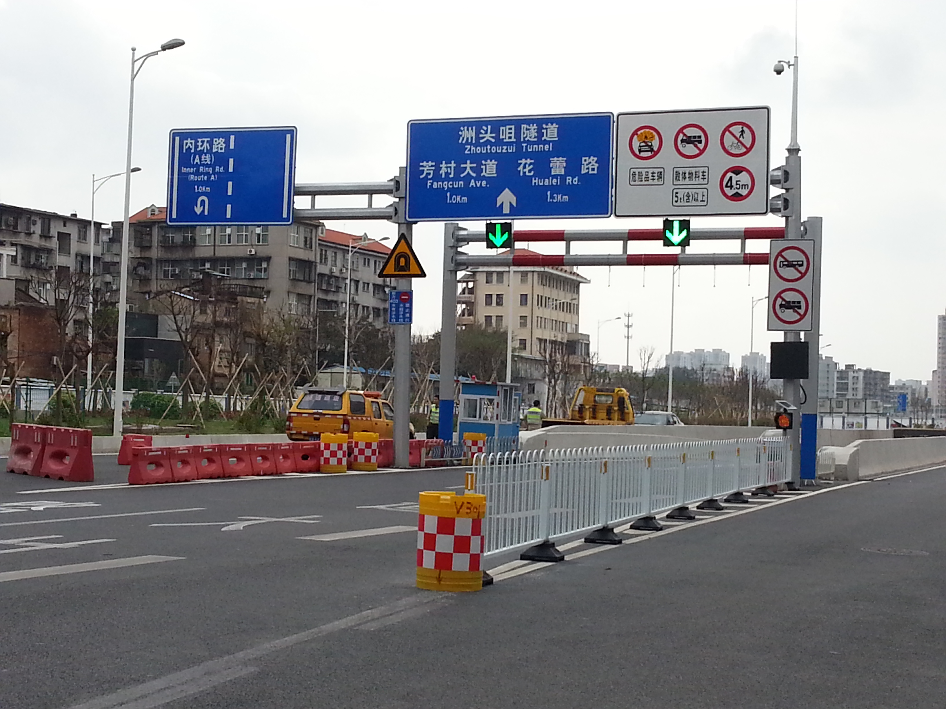 广州市洲头咀隧道海珠区入口